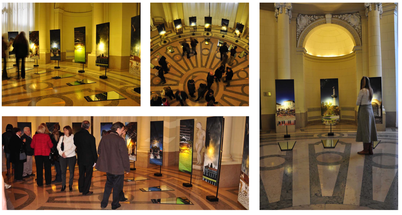 Espejos Urbanos - Otra forma de mirar Buenos Aires